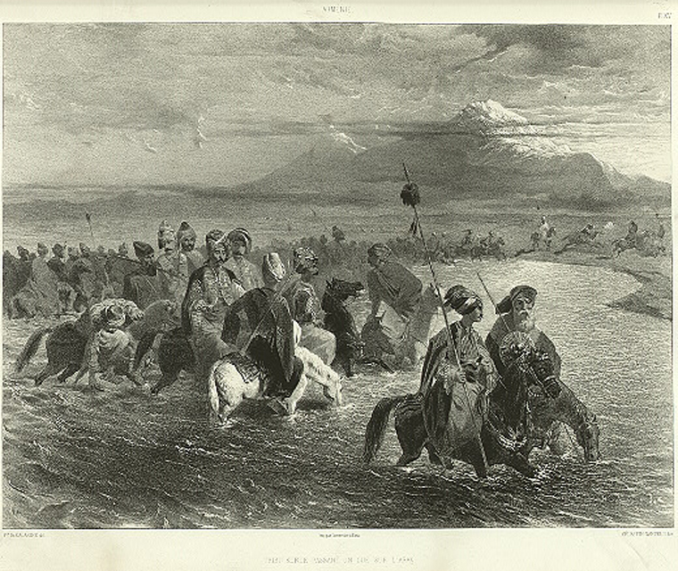 Armenie. Tribu kurde passant un gue sur L'arax.